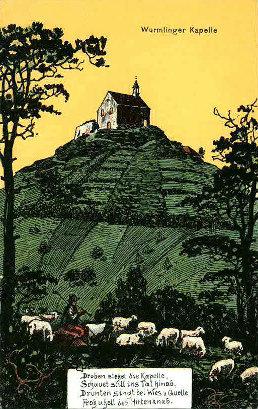 Ansichtskarte von Eugen Felle; Technoseum (Landesmuseum für Technik und Arbeit Mannheim)Motiv: Wurmlingen, Wurmlinger Kapelle